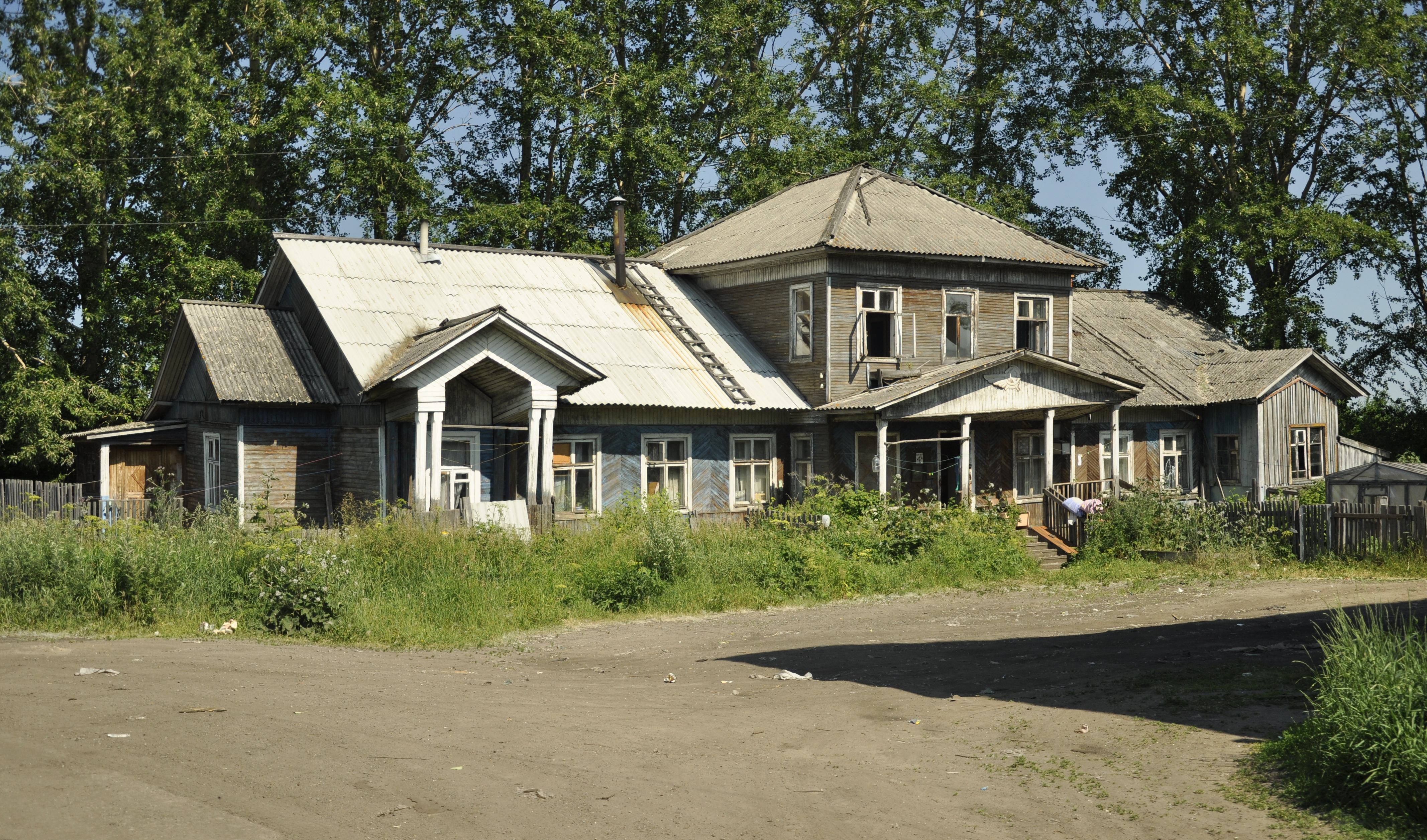 Kegostrov 2011